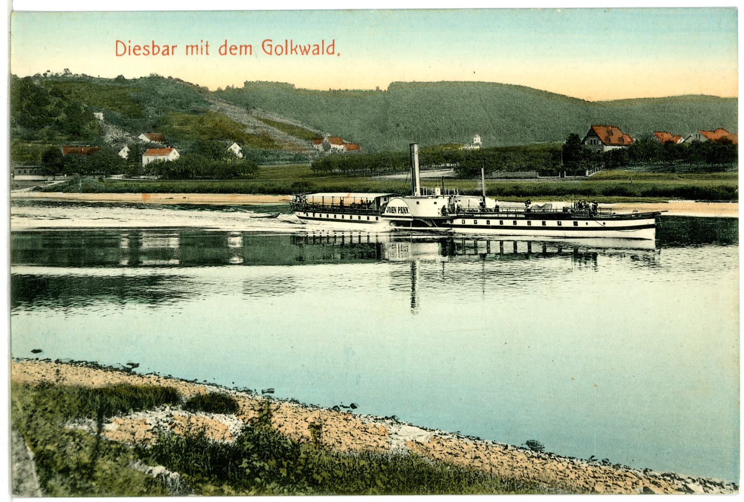 Diesbar; mit Golkwald, Elbe und Dampfer John Penn This postcard is from publisher Brück & Sohn in Meißen ( postcard has a unique number 04213 and is available in a higher resolution at the publisher. This images was uploaded in a cooperation project between Wikipedians and the publisher.